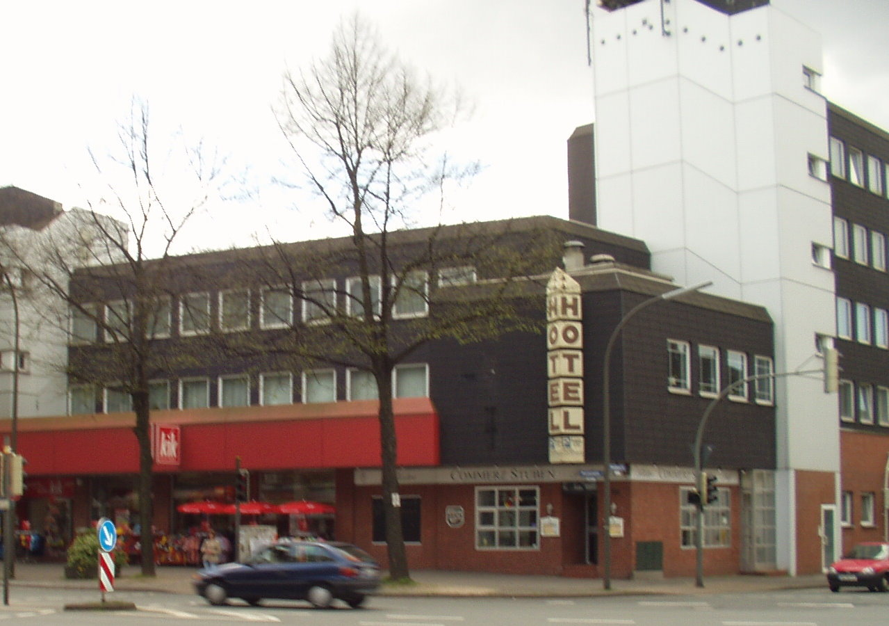 Hotel Commerz in Dortmund-Bövinghausen, Germany